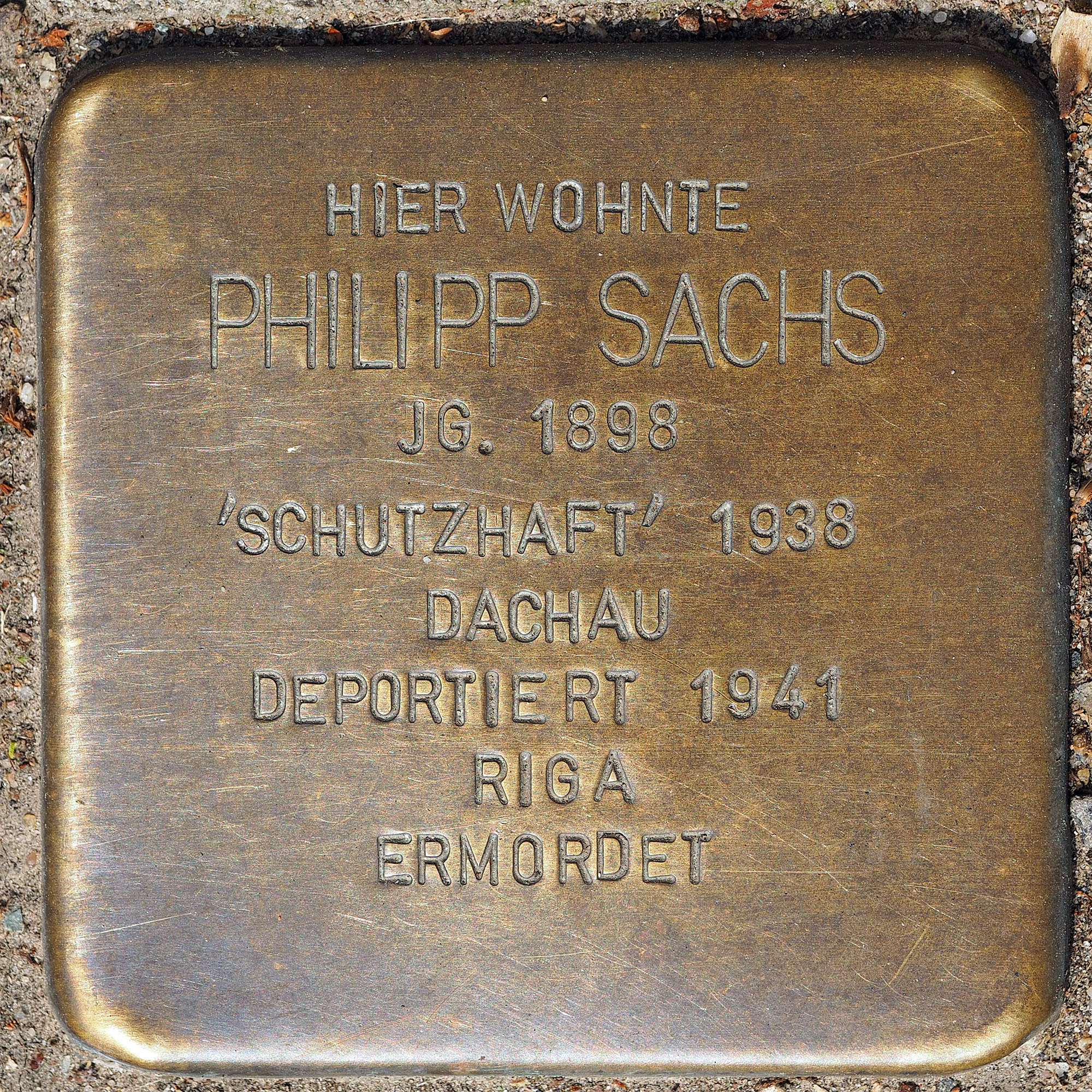 Stolpersteine GV: Sachs, Philipp